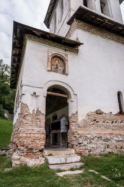 Biserica "Sf. Voievozi" a Mănăstirii Baia de Aramă - vedere sud 01